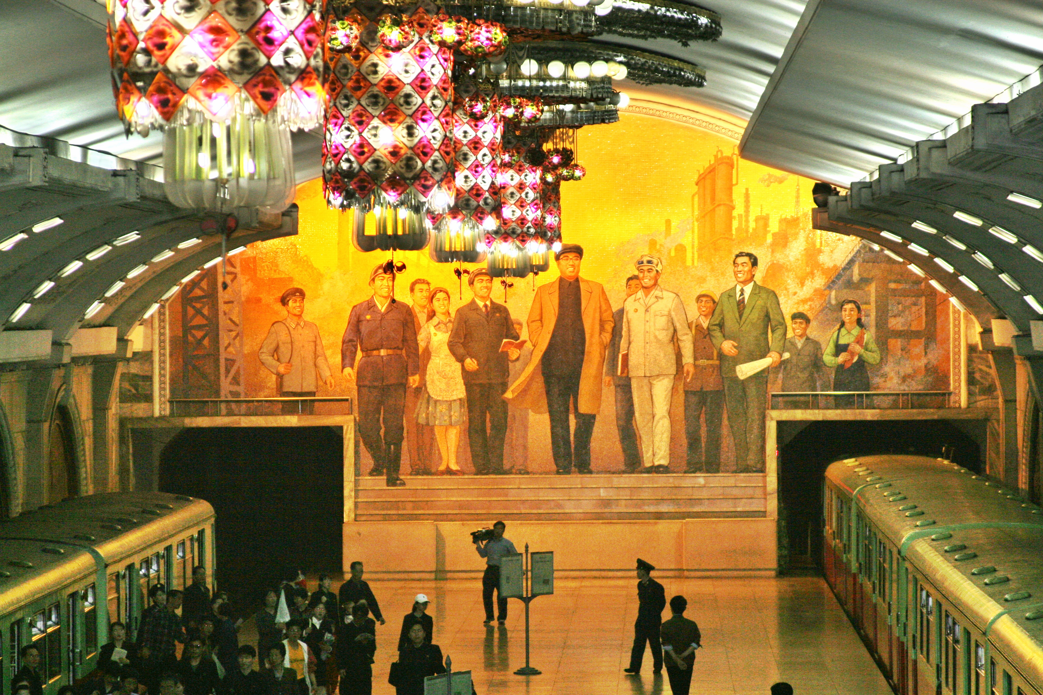 Pyongyang Metro